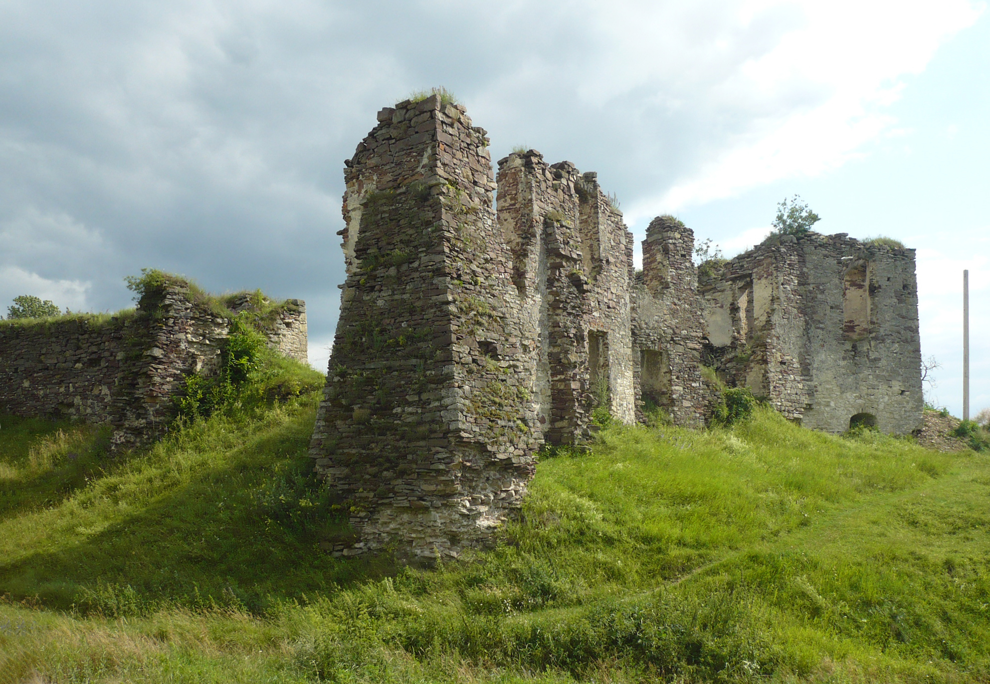 Podzameczek.Zamek